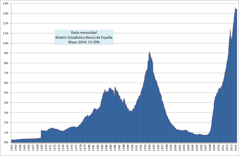 Ratio de morosidad en España desde 1962. Fuente: Boletín Estadístico del Banco de España. Capítulo 4. Cuadro 4.3